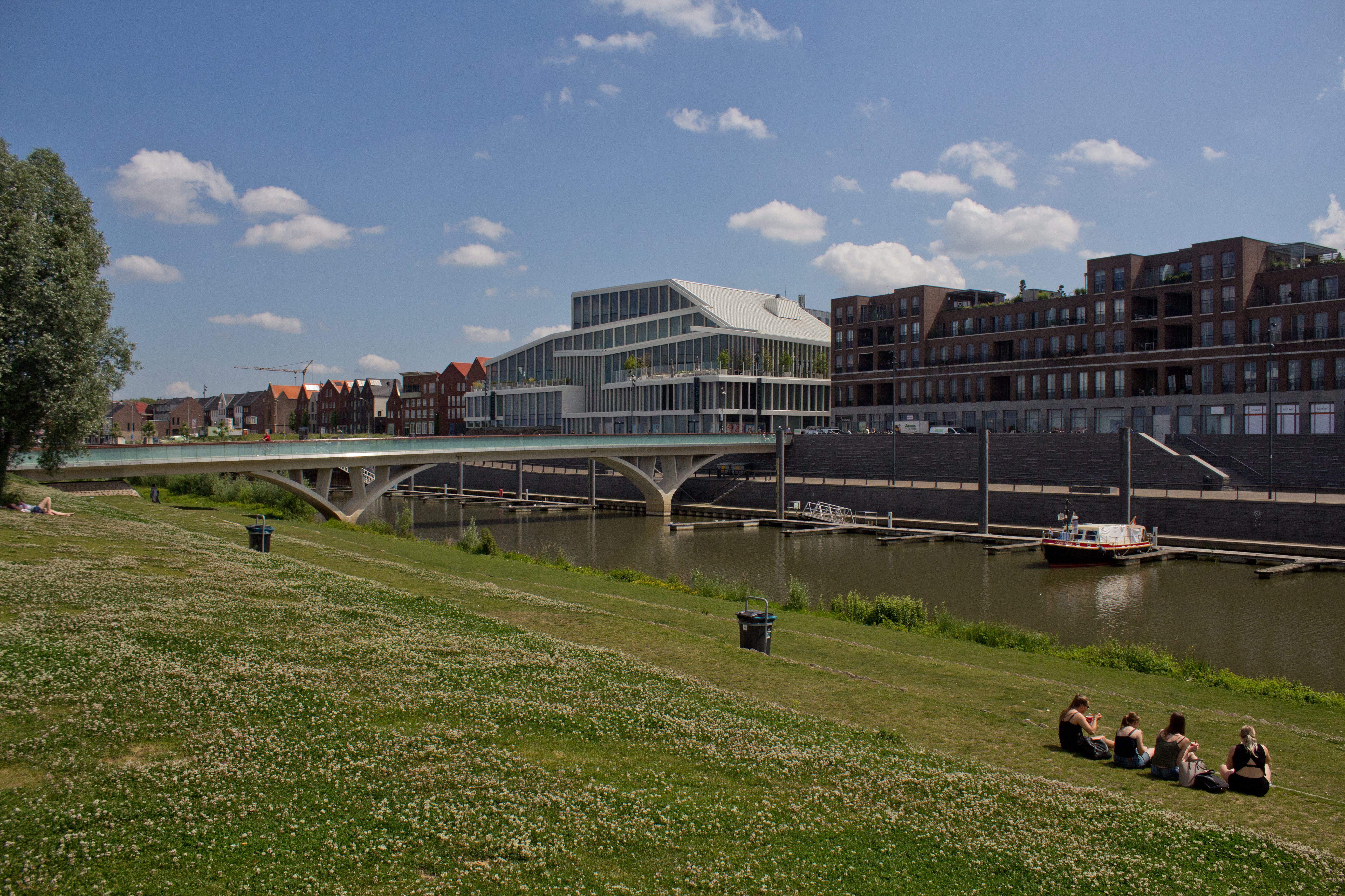 Zicht op een deel van de Maasboulevard in Venlo